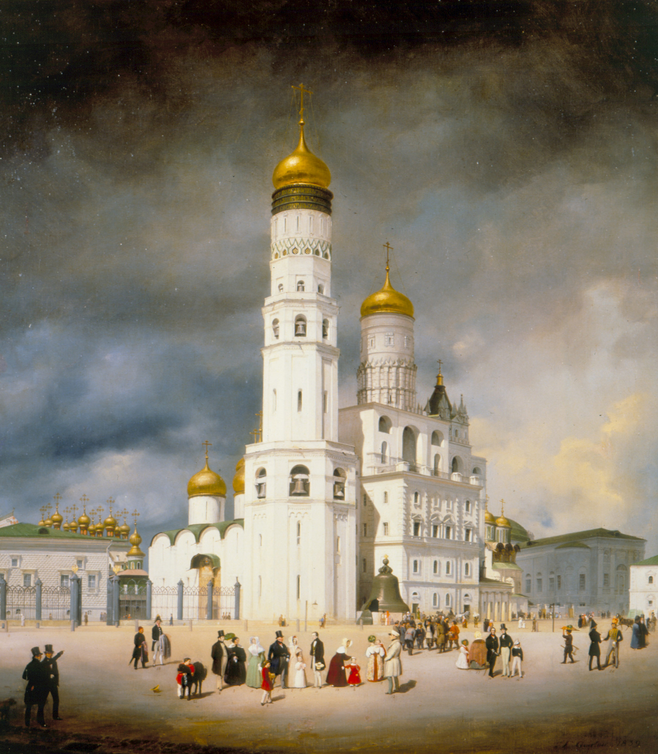 Ivanovskaya Platz im Moskauer Kreml